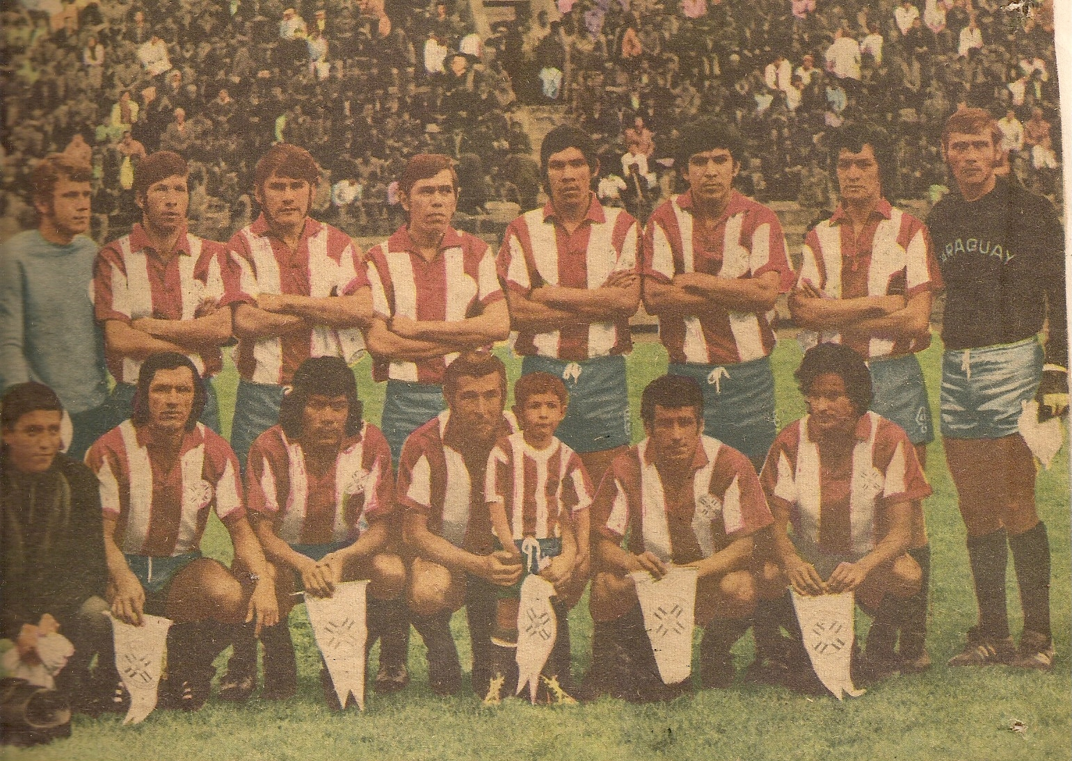 Arturo Galarza en la Selección Paraguaya